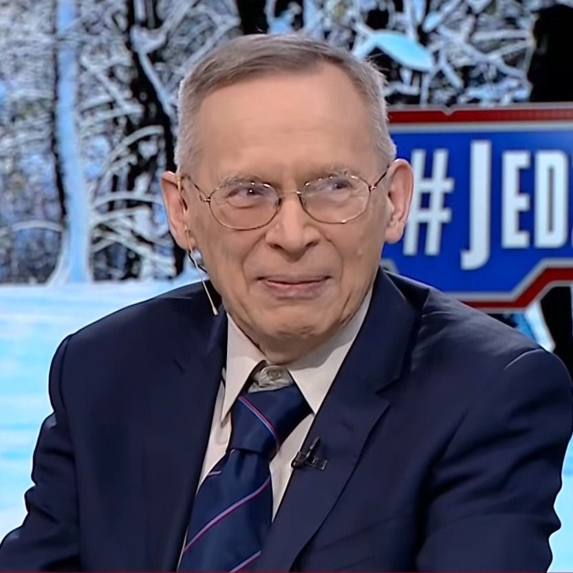 Prof. Włodzimierz Gut, mikrobiolog i wirusolog.